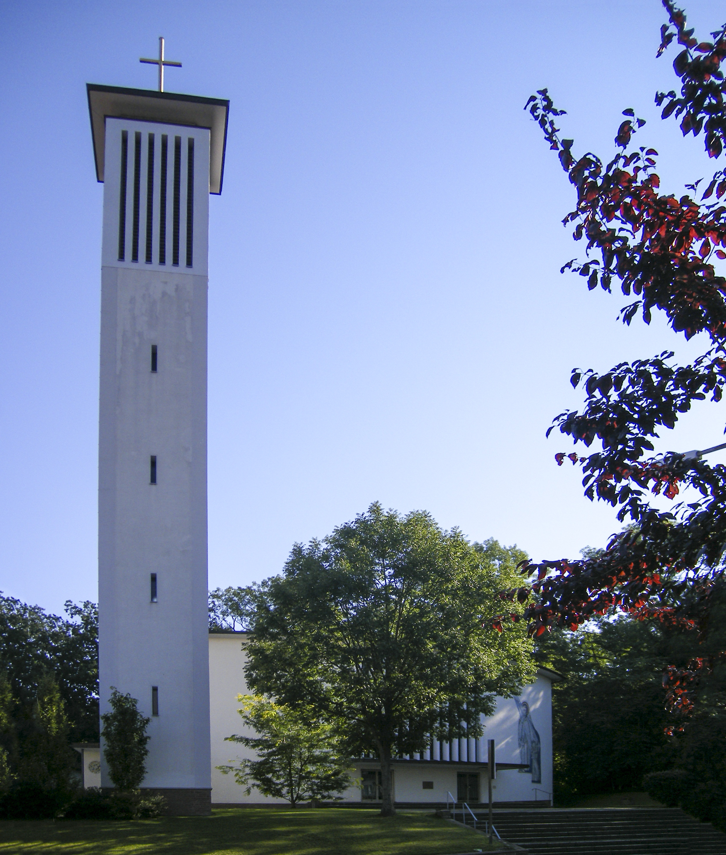 Der an einen Campanile erinnernde Kirchturm